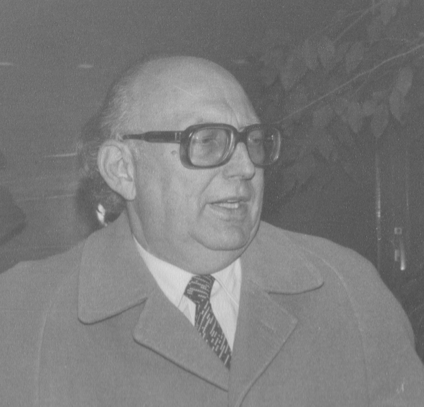 Wolfgang Mischnick